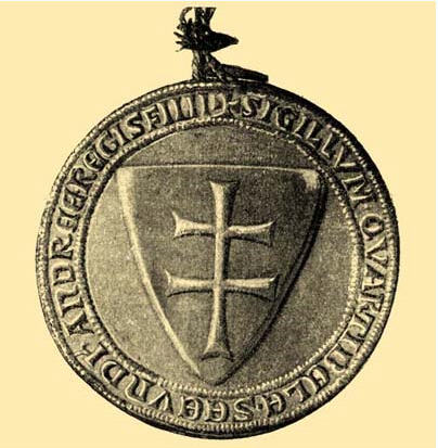 Béla IV. pečeť